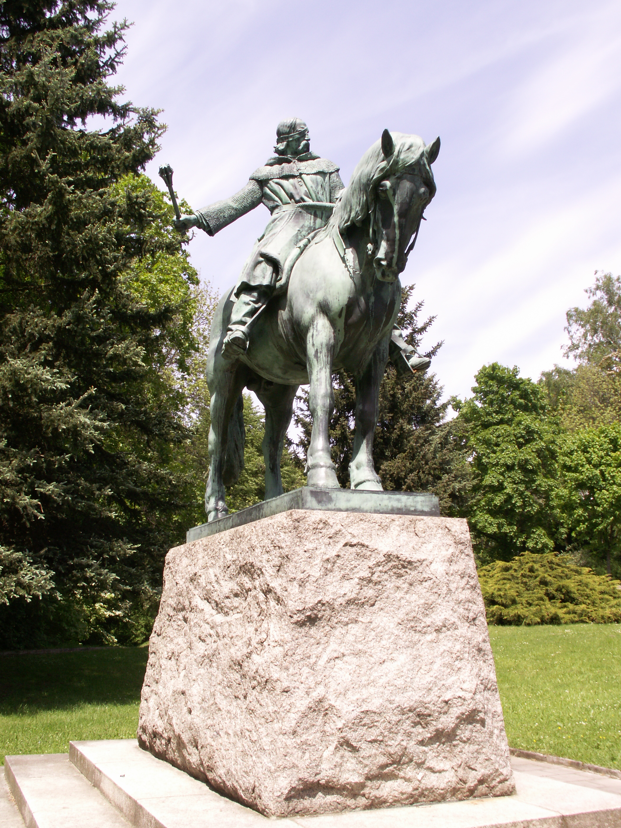 Pomník Jana Žižky z Trocnova (Přibyslav), Husova, Přibyslav